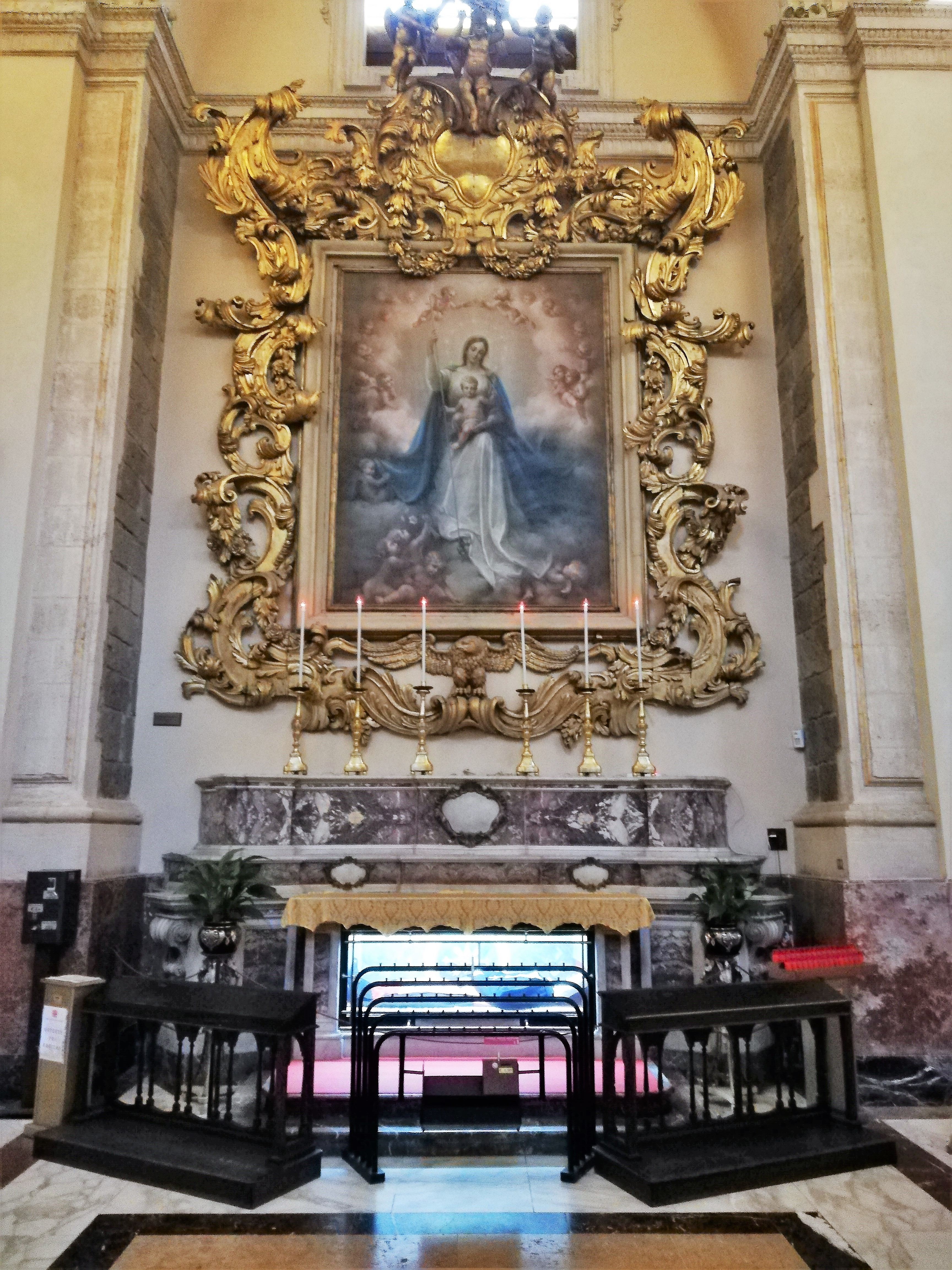 Cappella di Maria Santissima Corredentrice, dipinto raffigurante Maria Santissima Corredentrice, opera di Emanuele di Giovanni.